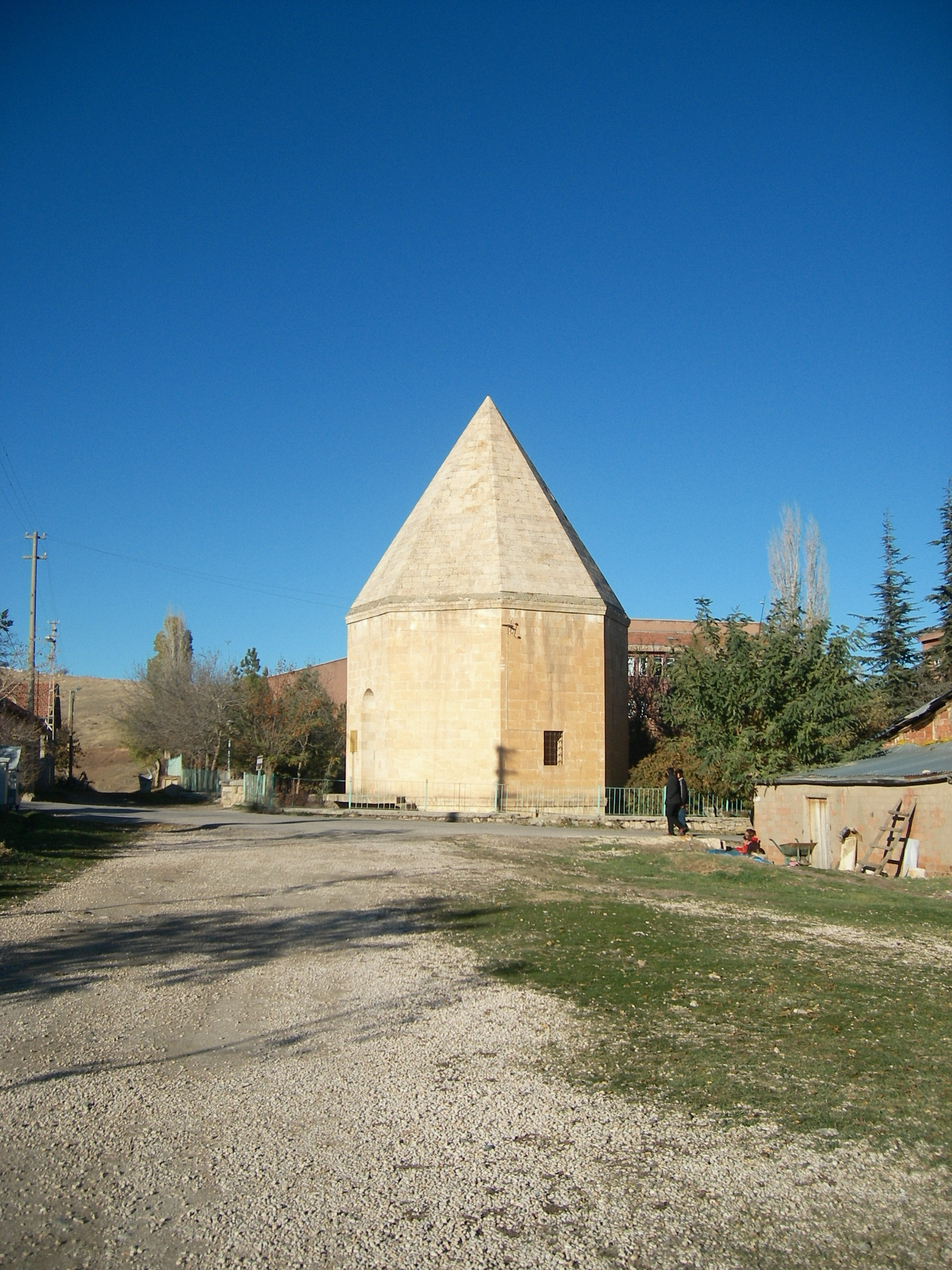 Elazığ'da Artukoğulları Türbesi